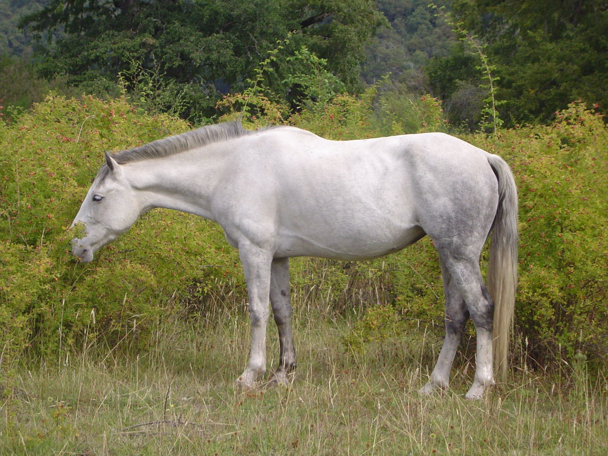 Caballo cimarrón en la zona de la cascada Chachín, Parque Nacional Lanín.